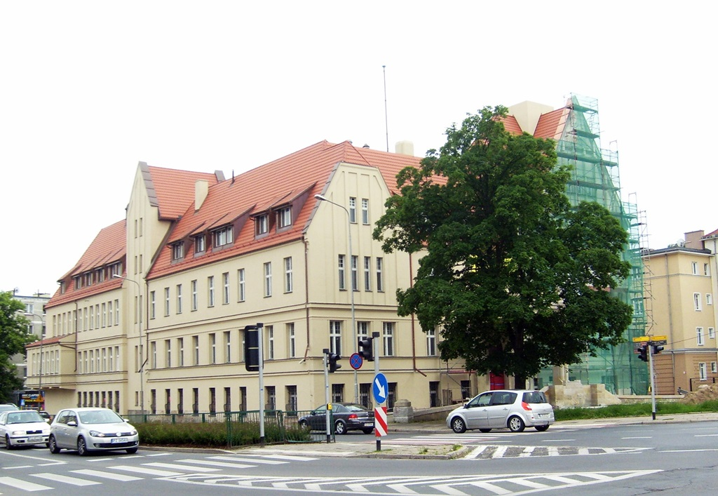 al. Niepodległości 30/Solna, d. Budynek Landratury Poznań-Wschód, d. PTV/TVP